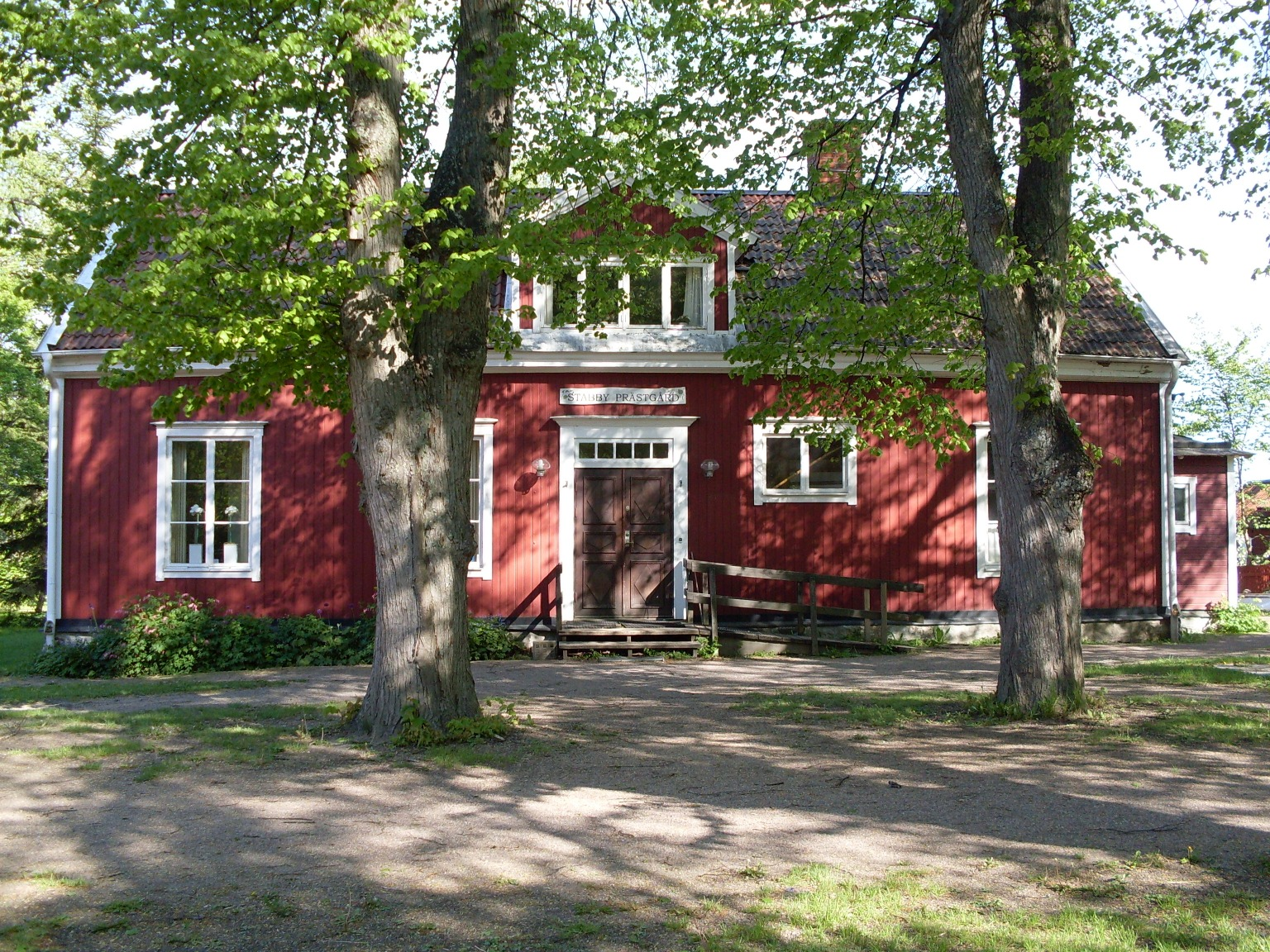 Stabby prästgård utanför Uppsala. Prästgården var boställe för kyrkoherden i Helga Trefaldighets (Bondkyrko) församling, en befattning som utgjorde prebende för en av professorerna i teologi vid universitetet. Här bodde Nathan Söderblom med familj åren 1901-1912. Gården ägs nu (2015) av Bondkyrko hembygdsförening. Denna bild föreställer själva "sätesbyggningen" som det kallas på en karta från 1890-talet, d.v.s. prästens egen bostad.